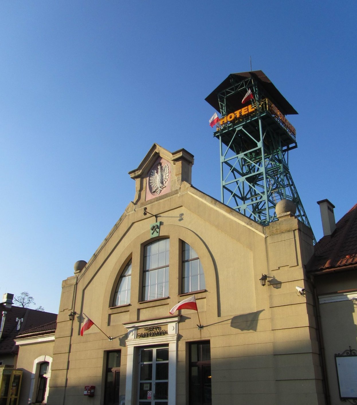 Kopalnia soli w Bochni - szyb Sutoris